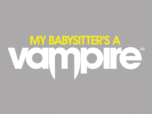 Logo der Fernsehserie Mein Babysitter ist ein Vampir